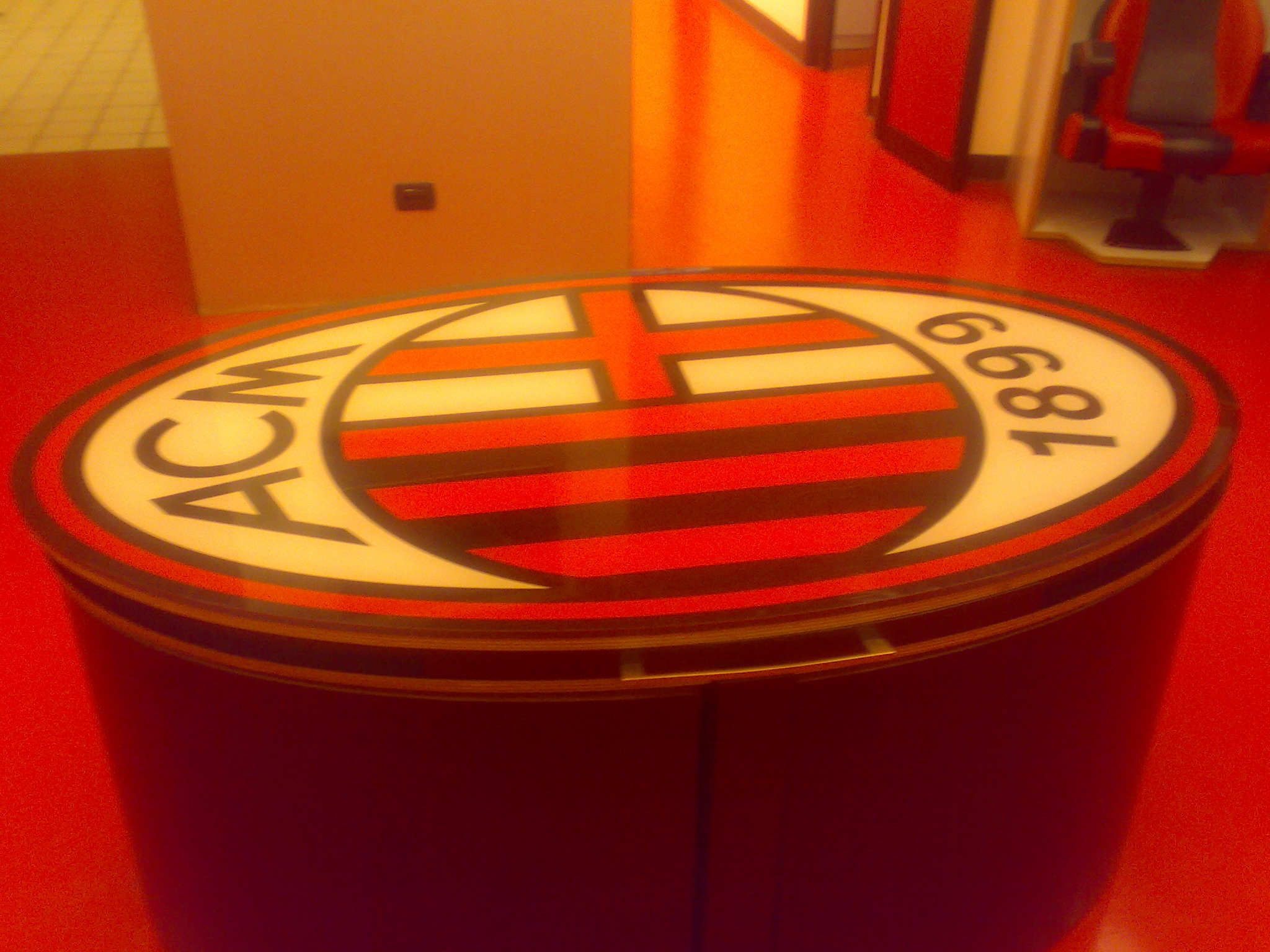 tavolo dello spogliatoio del milan allo stadio di San Siro "Giuseppe Meazza" a Milano